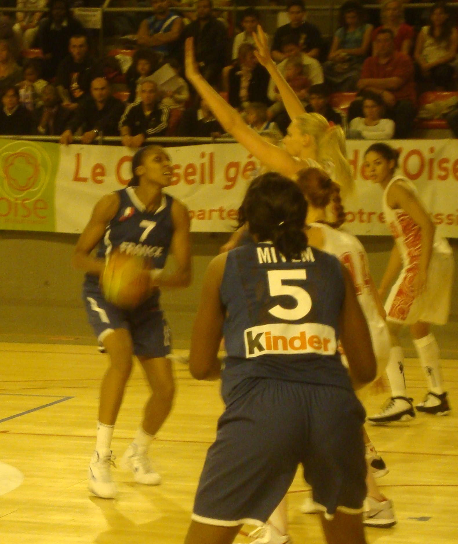 La basketteuse française Sandrine Gruda